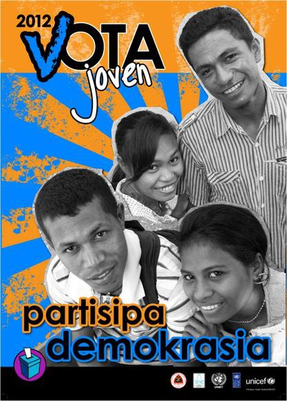 Wahlaufruf an die Jugend zur Teilnahme an den Wahlen